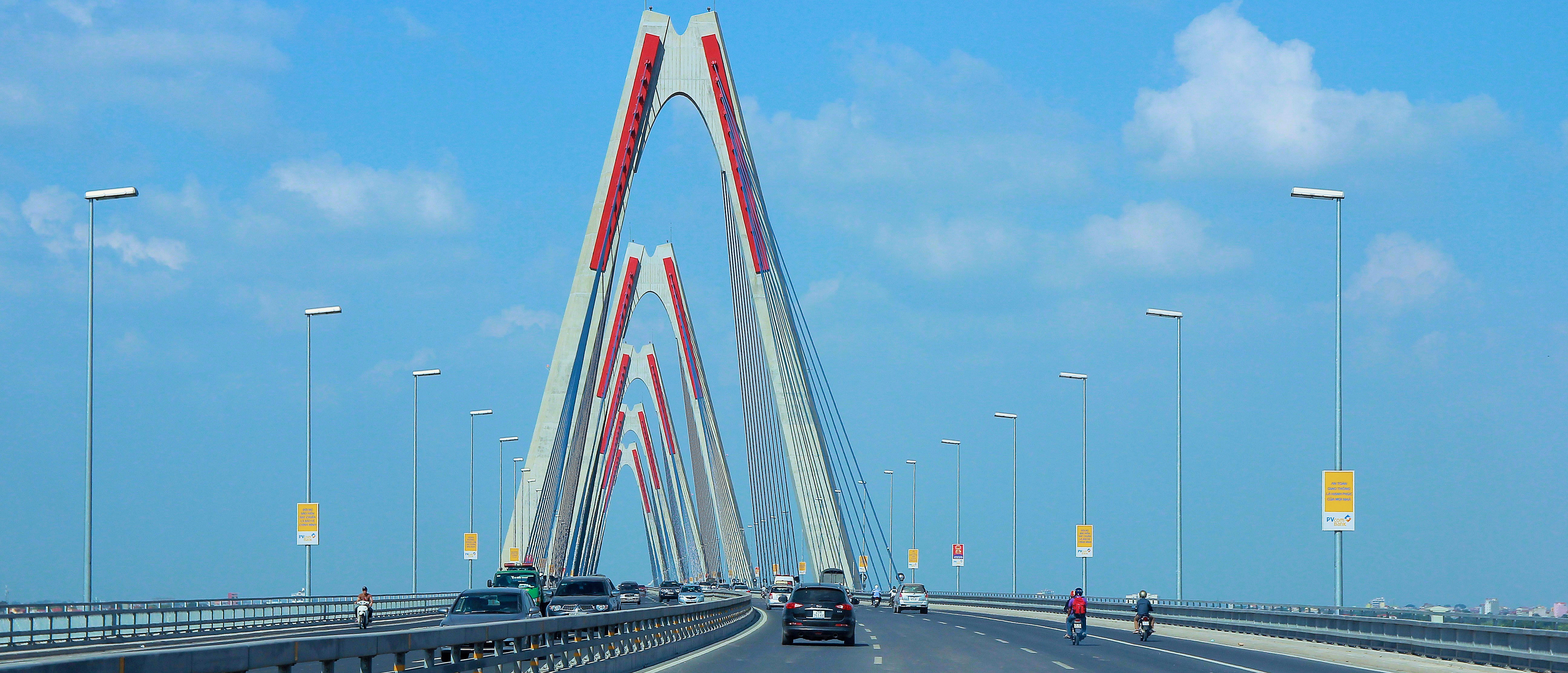 Nhat Tan Bridge